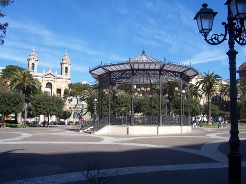 Piazza Garibaldi in Tarent